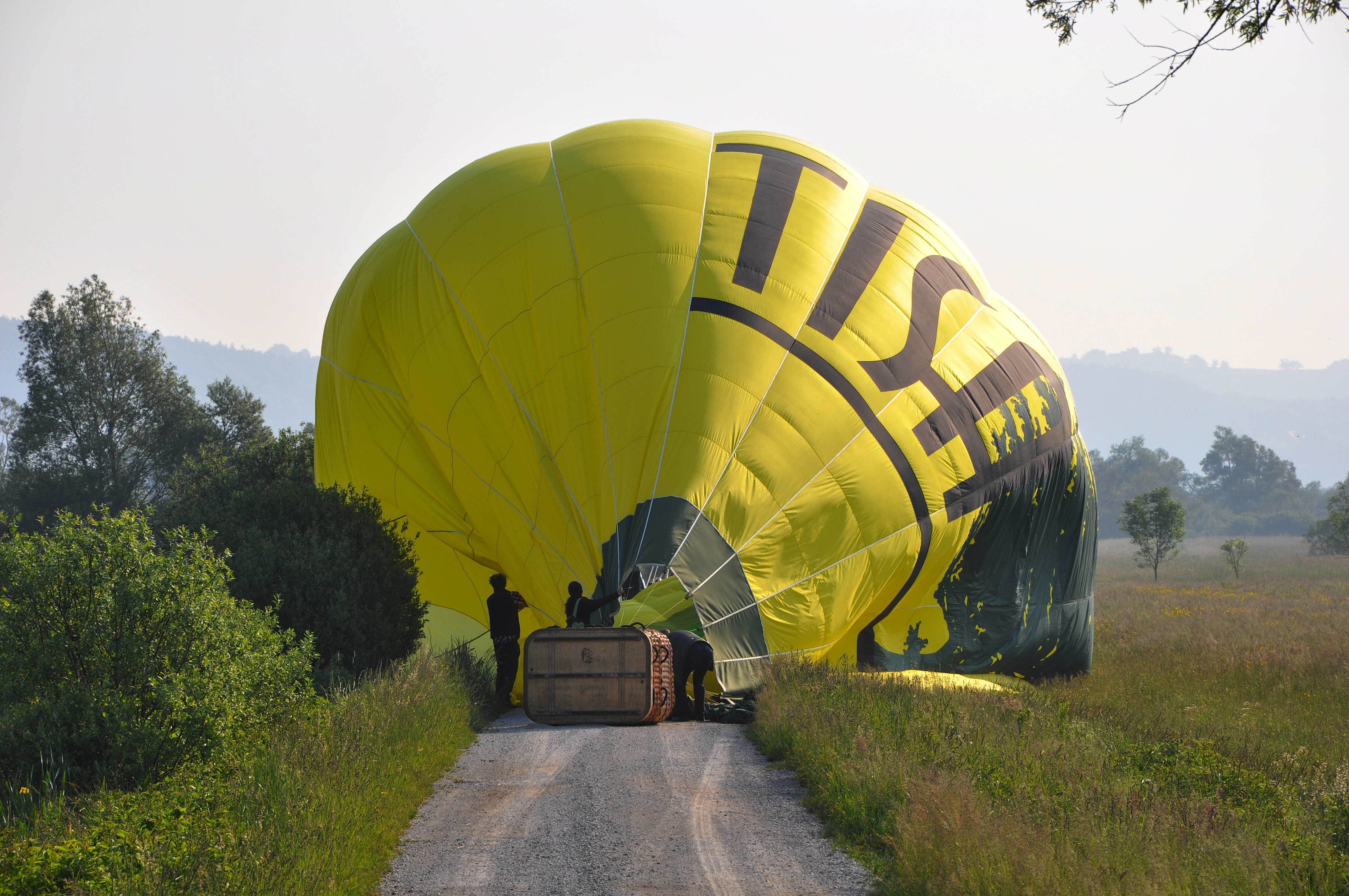 Pospravljanje balona na Ljubljanskem barju